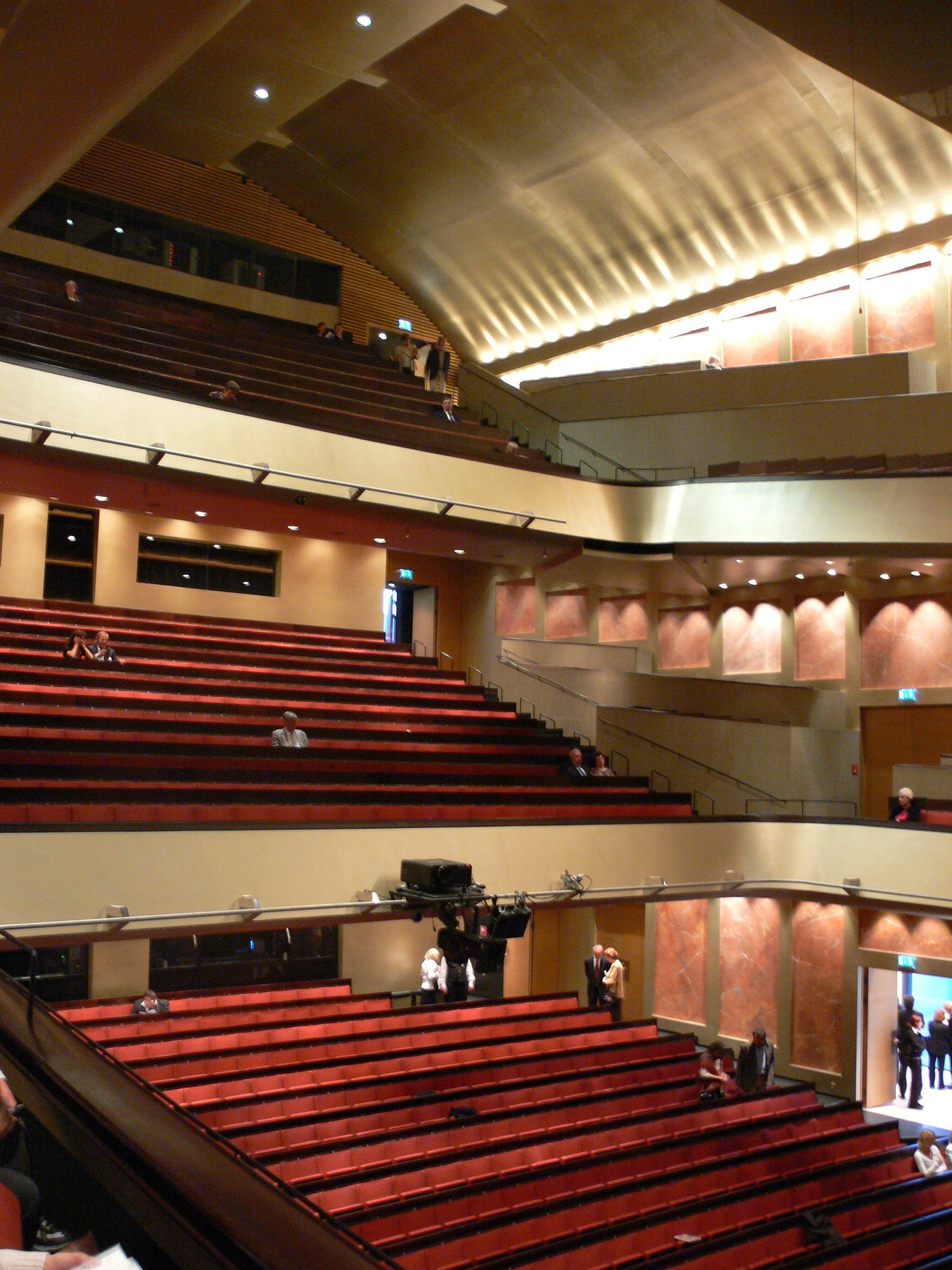 Salzburg, Festspielhauskomplex, Haus für Mozart (Kleines Festspielhaus) Zuschauerraum